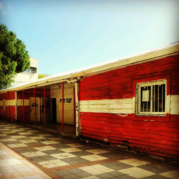 הצריף לפני שיפוצו בשנת 2013